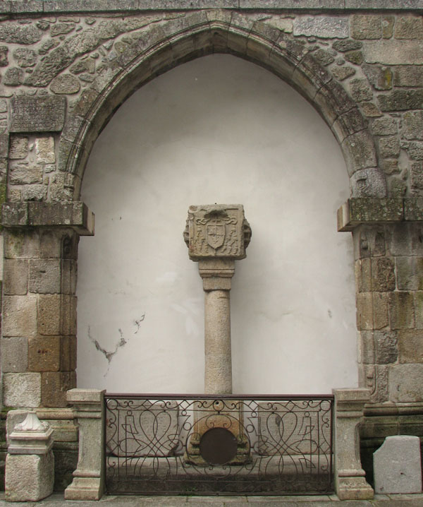 Restos (ruínas) do Pelourinho de Braga na Sé Catedral homónima..